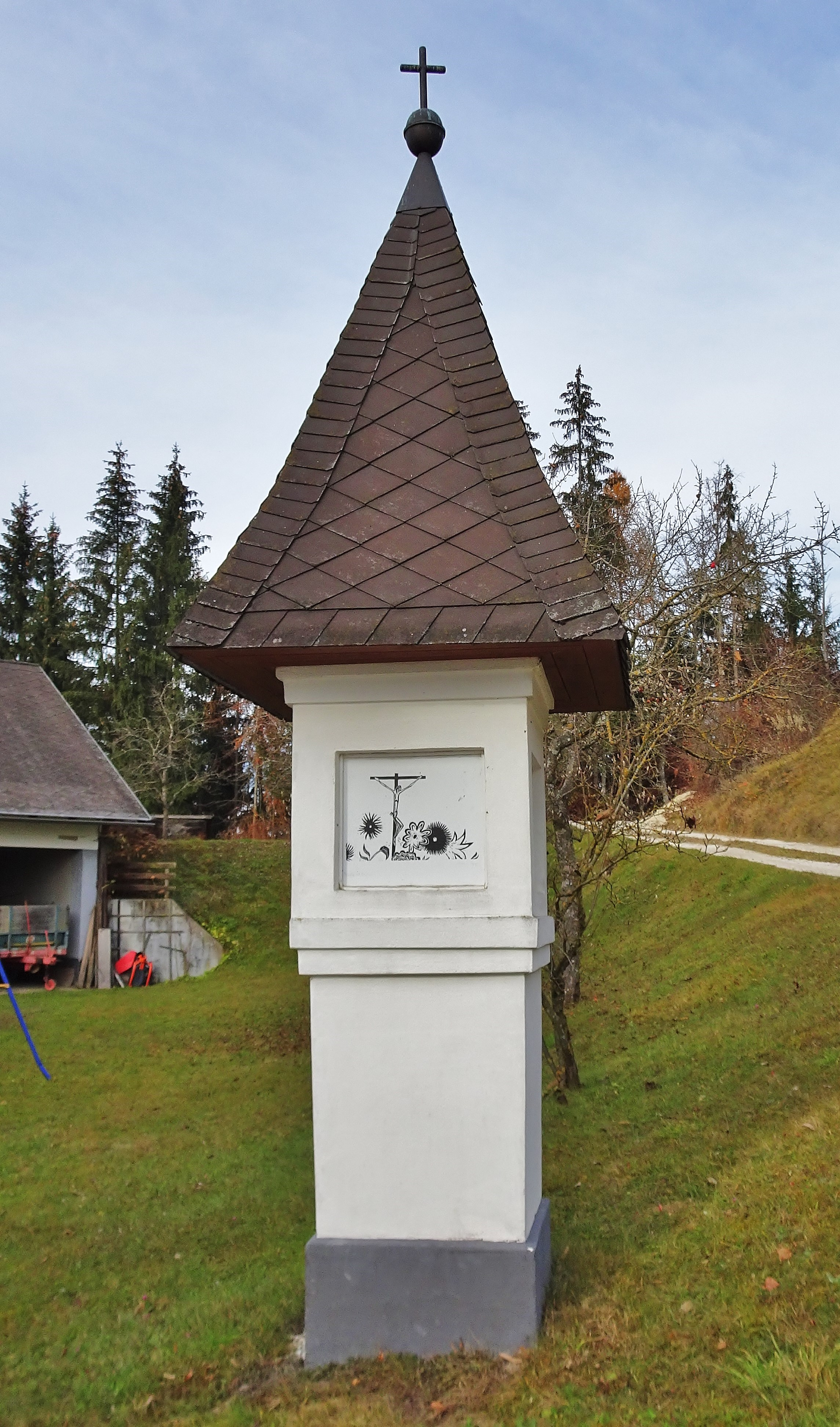 Von Werner Berg gestaltetes Wegkreuz an der Einfahrt zum Rutarhof